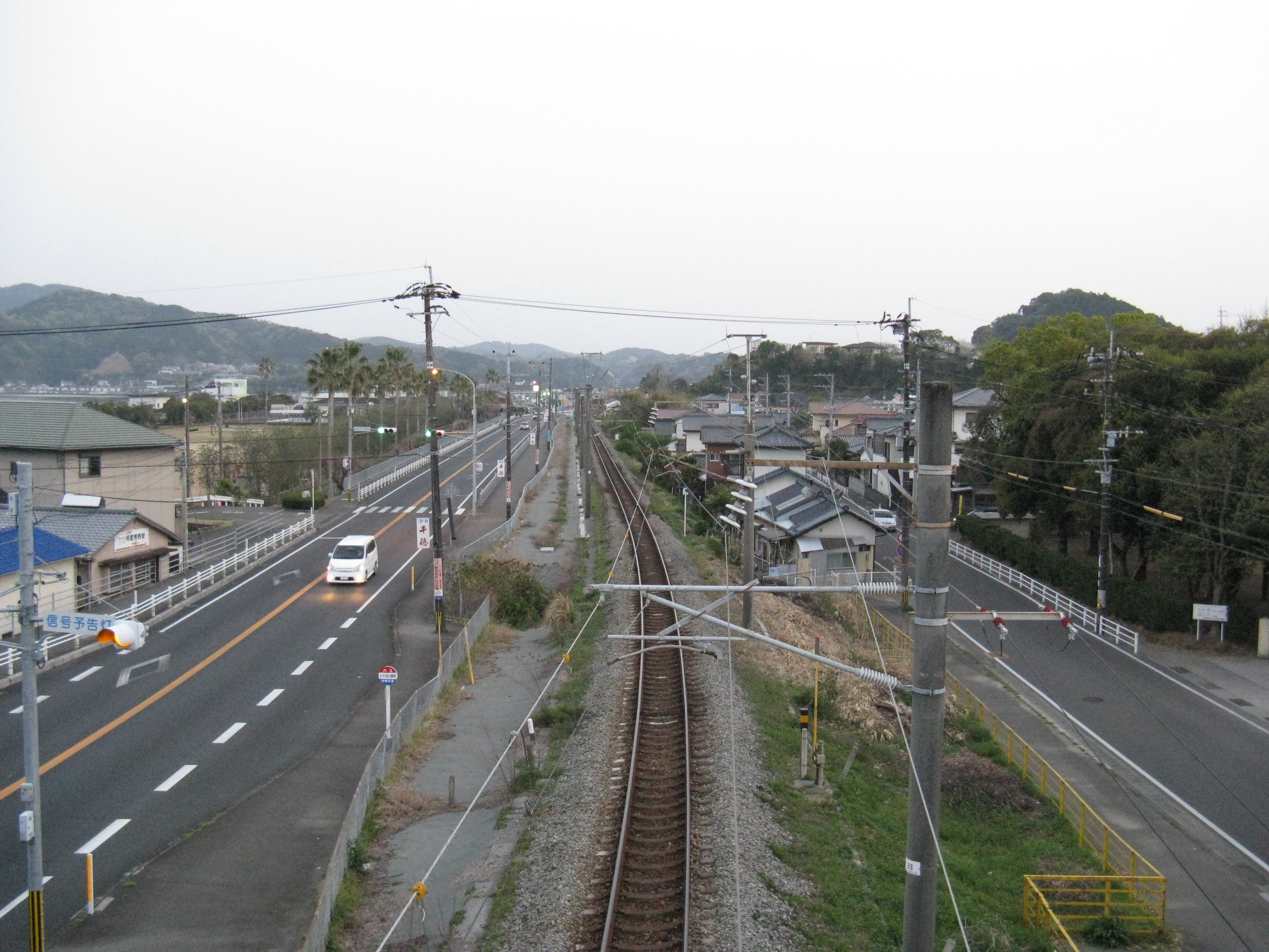 土々呂海水浴場駅跡付近。歩道橋より。